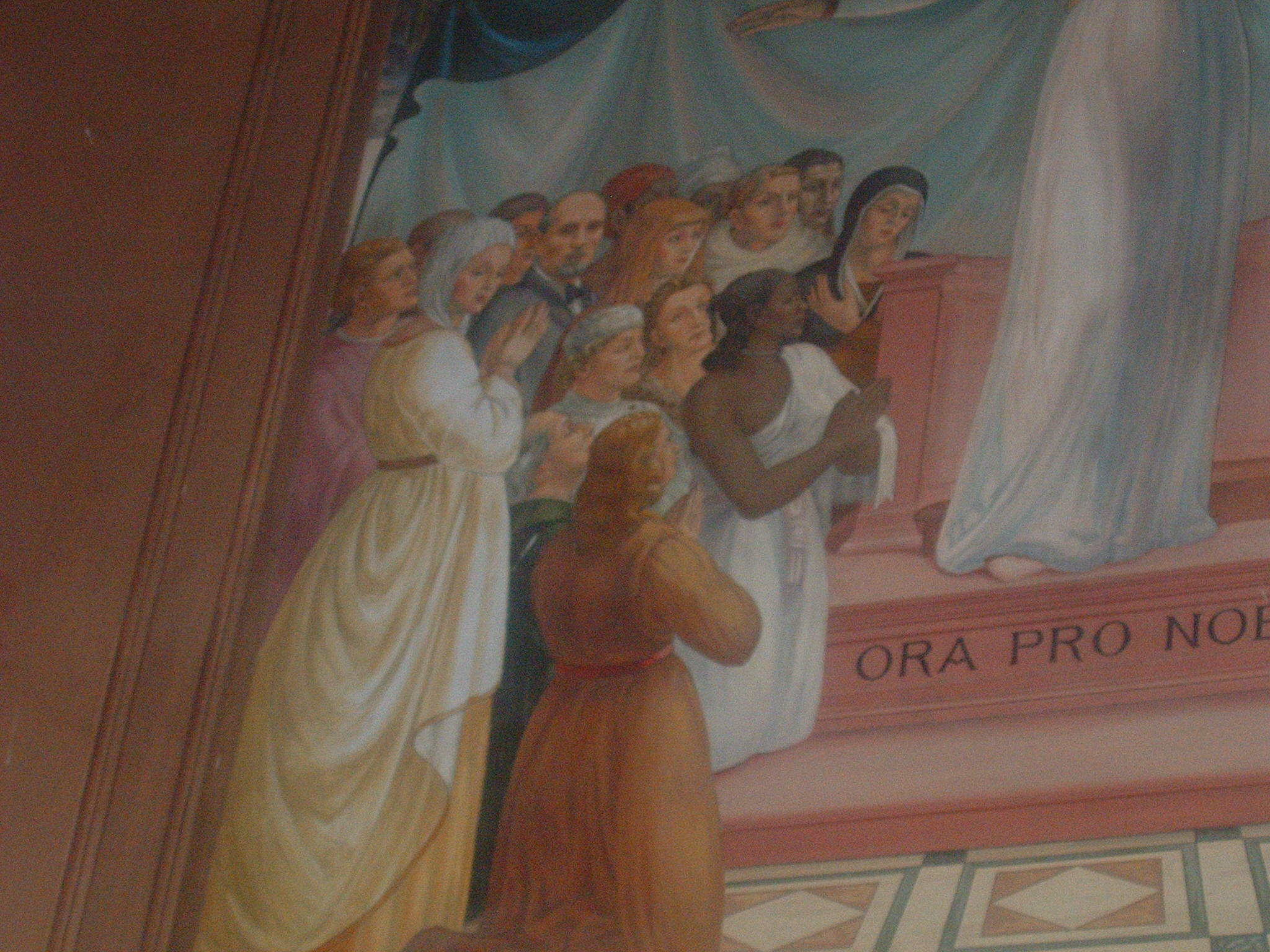 Foto scattata da me il 10 giugno 2008 Antonio Barluzzi in un affresco della chiesa della Visitazione ad Ain Karem